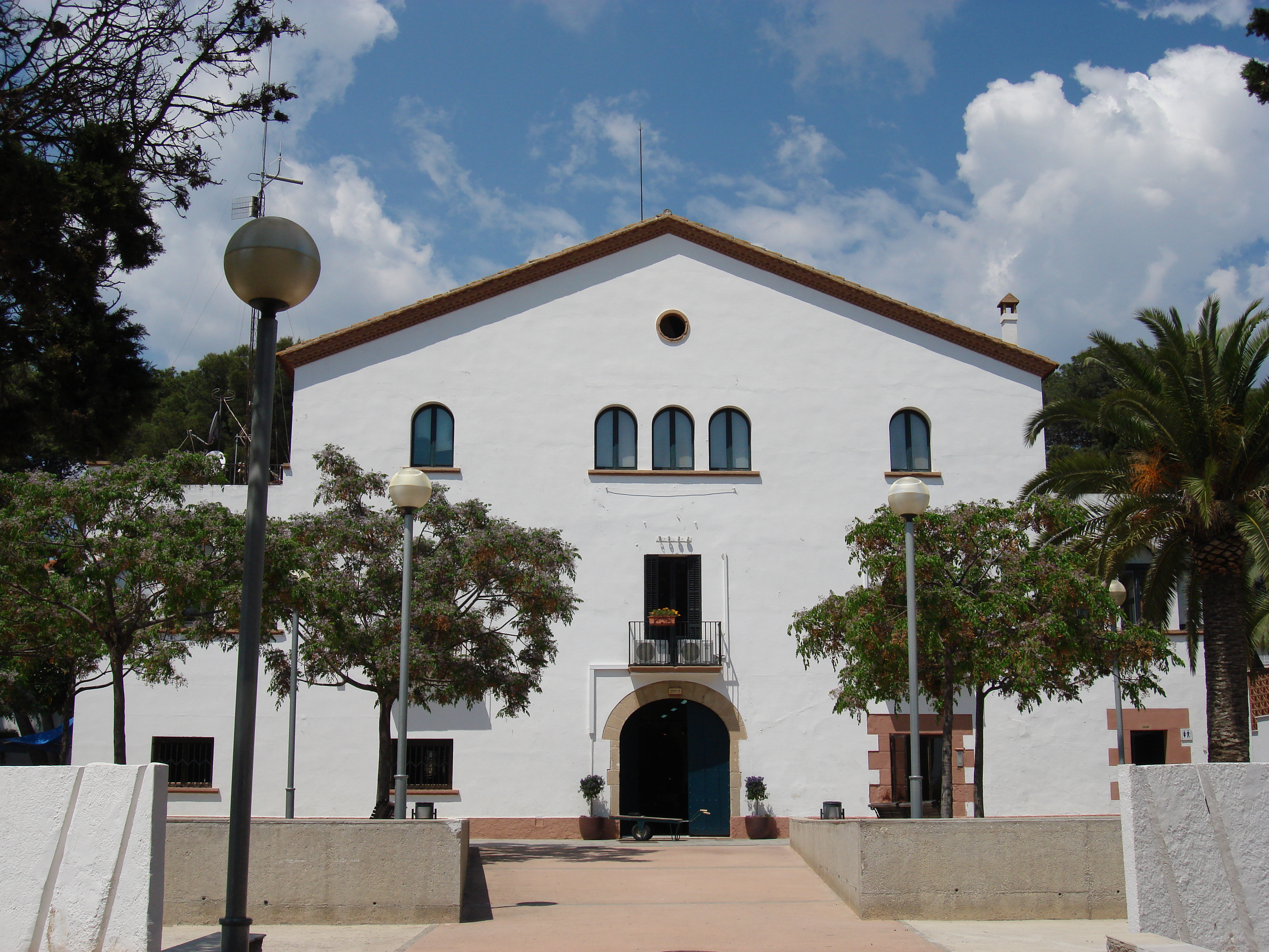 Masia Can Sellarès, al parc de Can Sellarès i seu de la ràdio local.